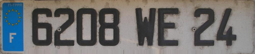 Номерний знак